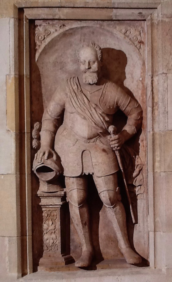 Grabdenkmal in St. Martinsdom zu Preßburg aus dem Jahre1601